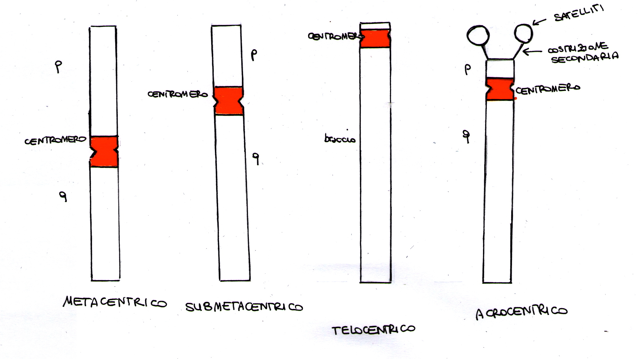 Autore: Brugnoni Francesca L'immagine riguarda le varie tipologie cromosomiche distinte in base alla loro posizione centromerica.